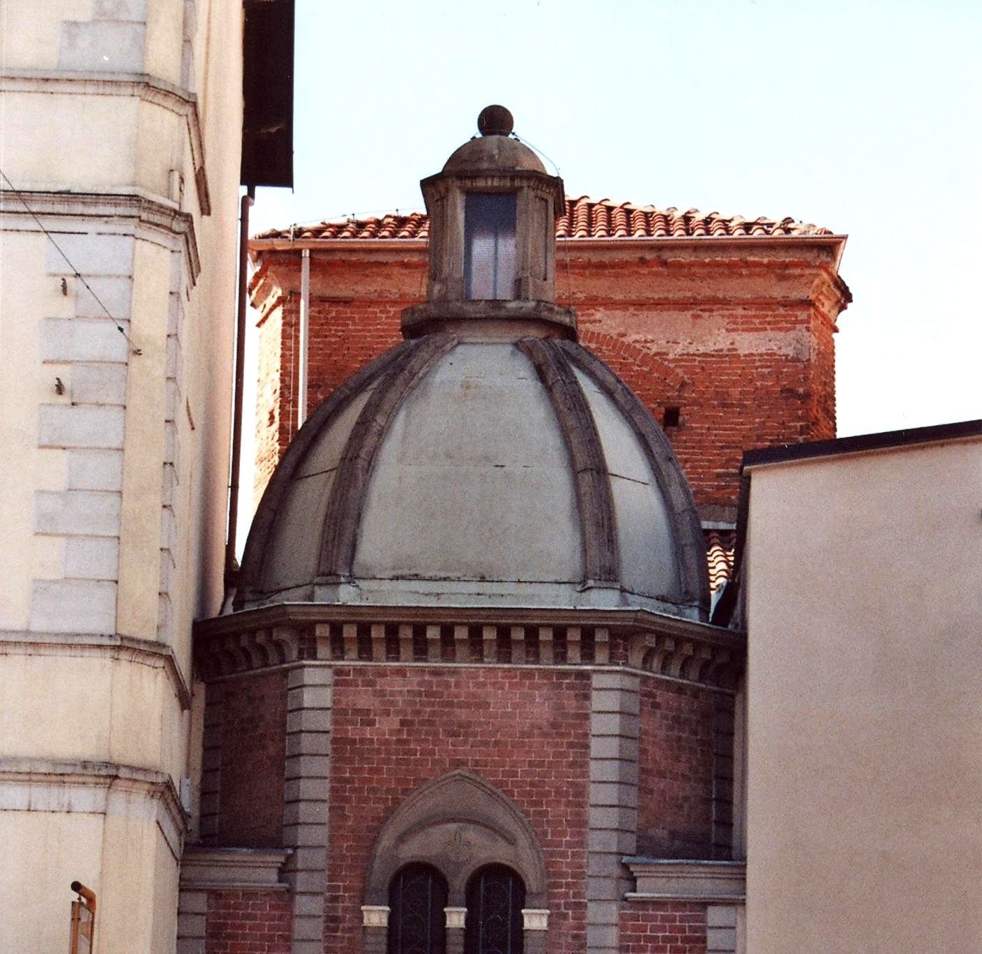 Fara Novarese (NO), Parrocchiale dei Santi Fabiano e Sebastiano: battistero. Sul retro, Scurolo di San Damiano.